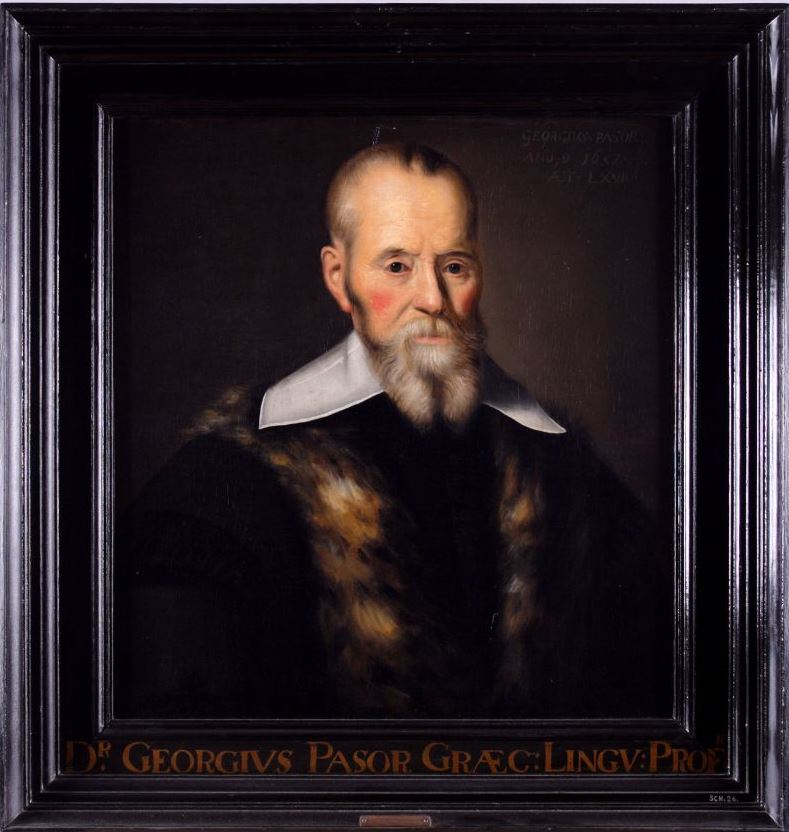 Portret in olieverf van Georgius Pasor, professor Grieks aan de Franeker universiteit van 1626 tot 1637. Georgius Pasor (Ellar 1 augustus 1570 -– Franeker 10 december 1637) studeerde theologie in Herborn, Lausanne en Genève. Na enige tijd als hofleraar op de Dillenburg gewerkt te hebben werd hij hoogleraar Hebreeuws in Herborn. De grammatica van het Nieuwe Testament was zijn voornaamste onderzoeksonderwerp. In 1626 trok hij naar Franeker waar hij hoogleraar Grieks werd. (tekst Museum Martena)